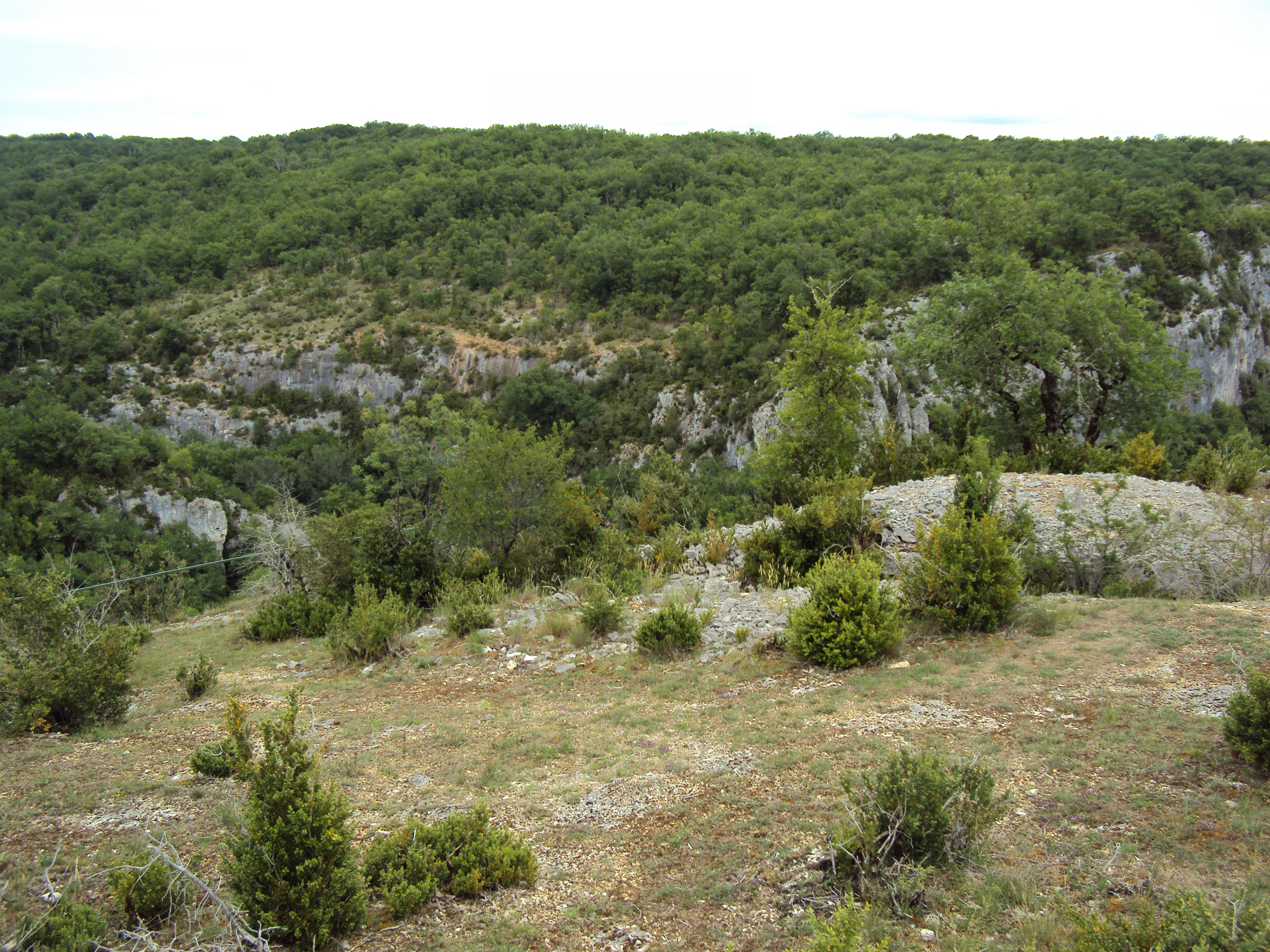 Sur le site de l'oppidum de Murcens - Vers l'est - Lot - France - 2011 Ænglisc: On the site of the oppidum of Murcens - The east cliff - Lot - France - 2011